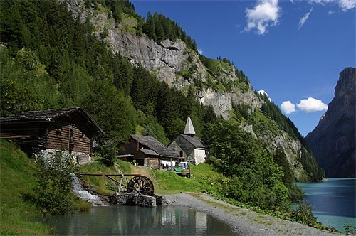 Walsersiedlung Sankt Martin im Calfeisental